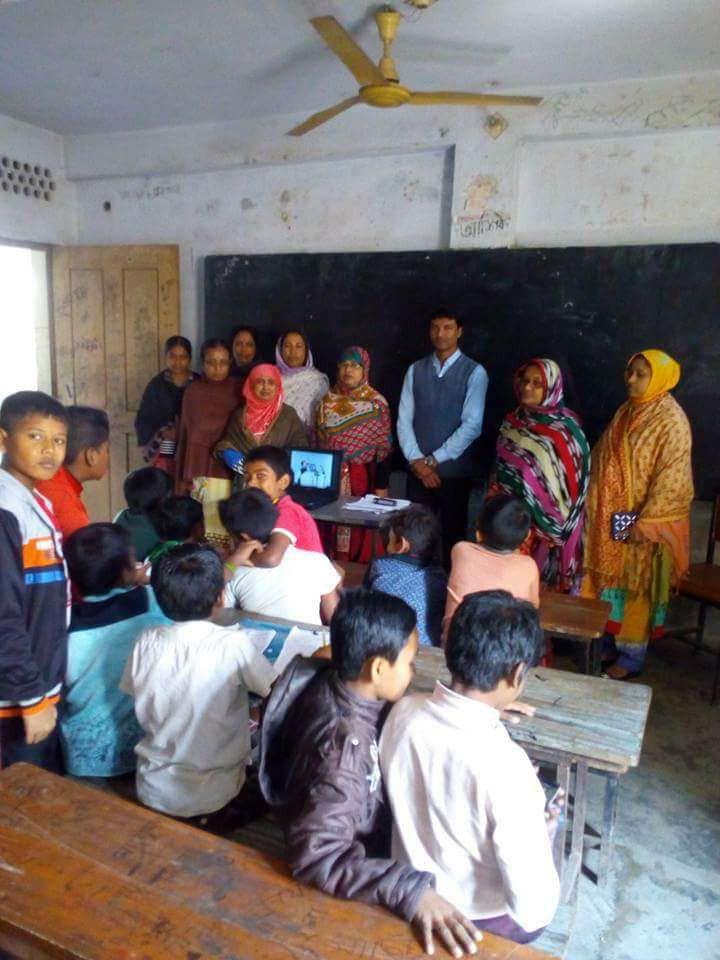 রাজাপুর সরকারি প্রাথমিক বিদ্যালয়ের ফেচবুক পাতার কভার ফটো।